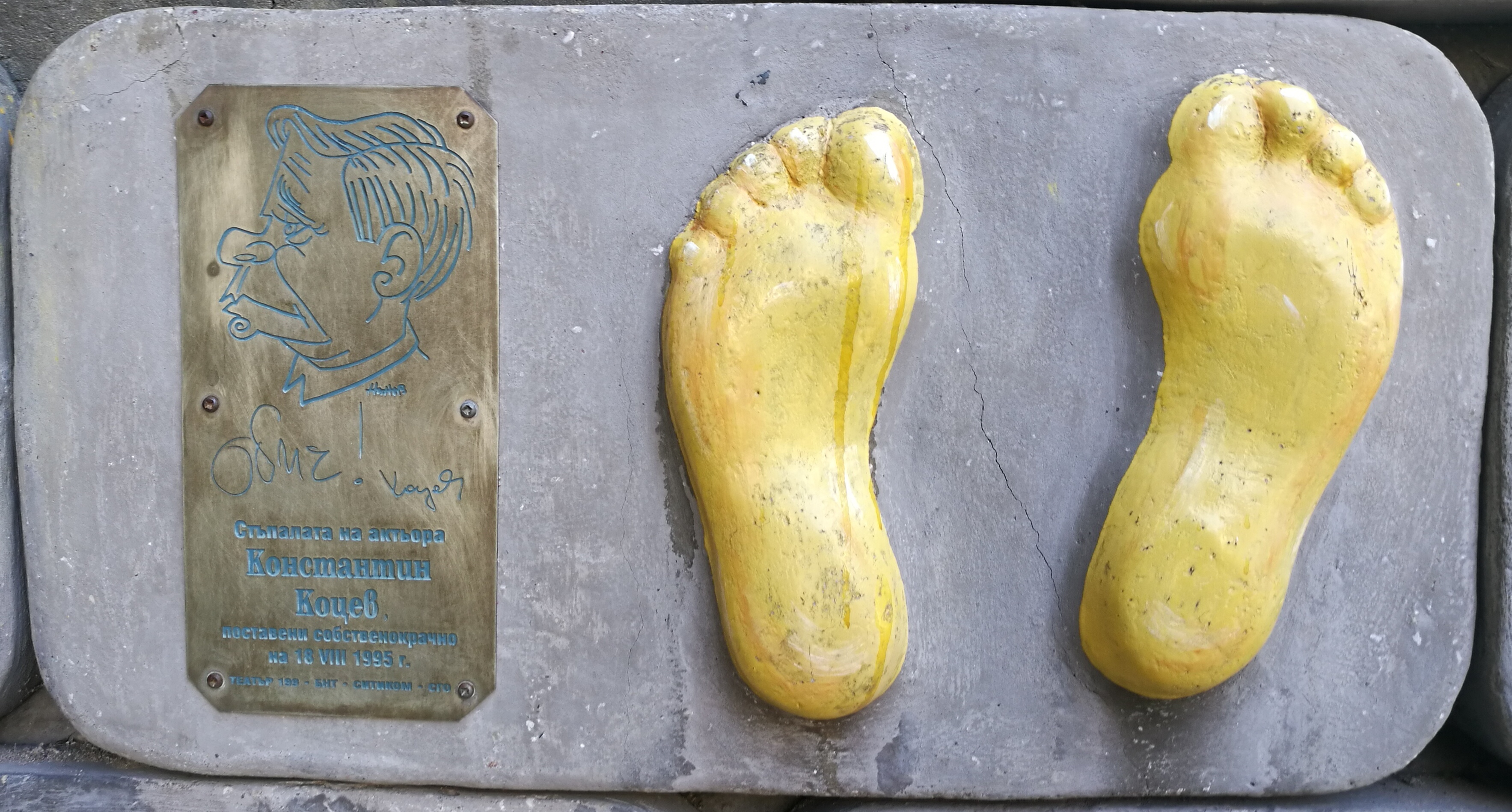 Стената на славата пред Театър 199 - пано с отпечатъци, послание и шарж на Константин Коцев.